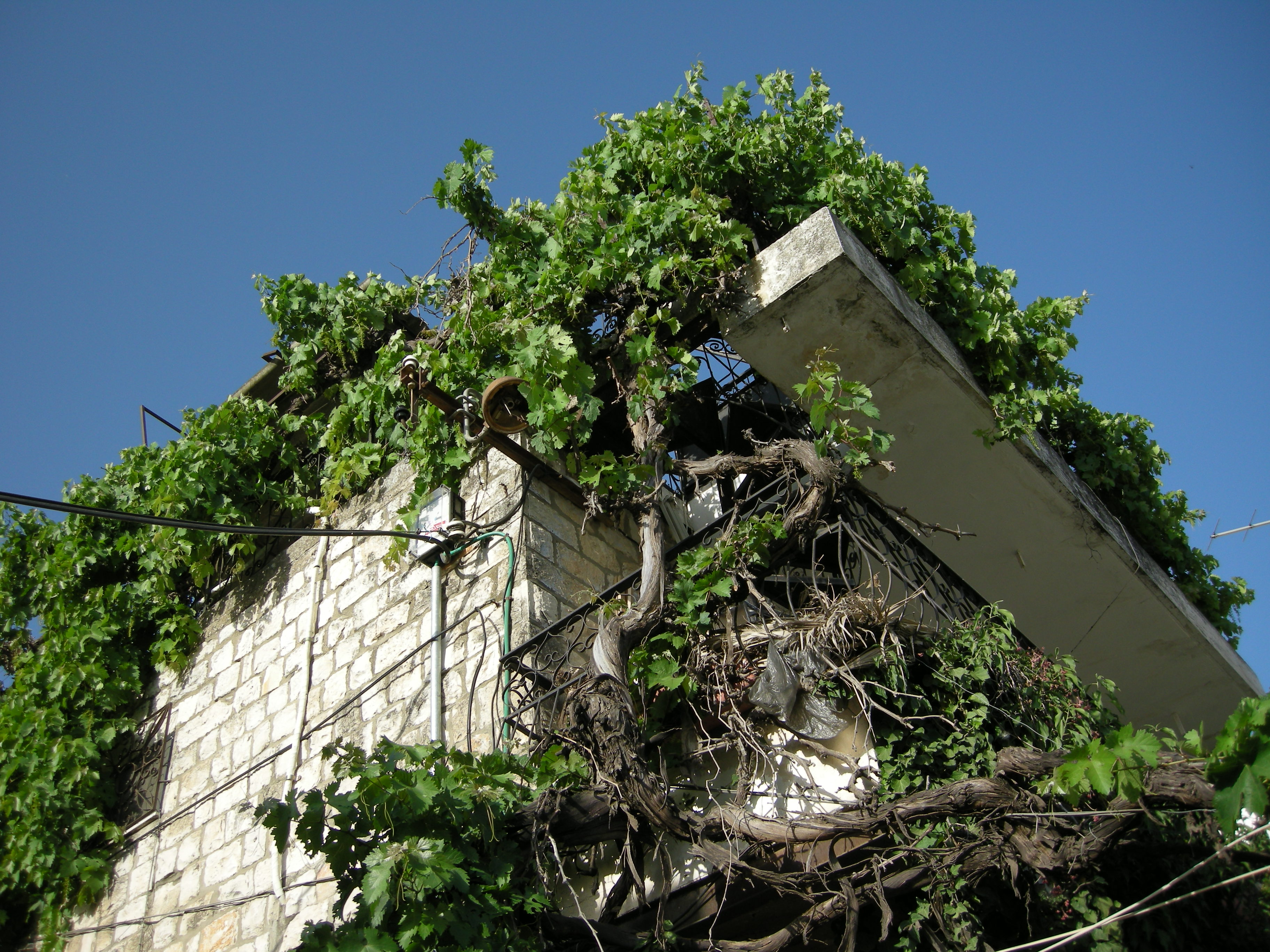 Safed